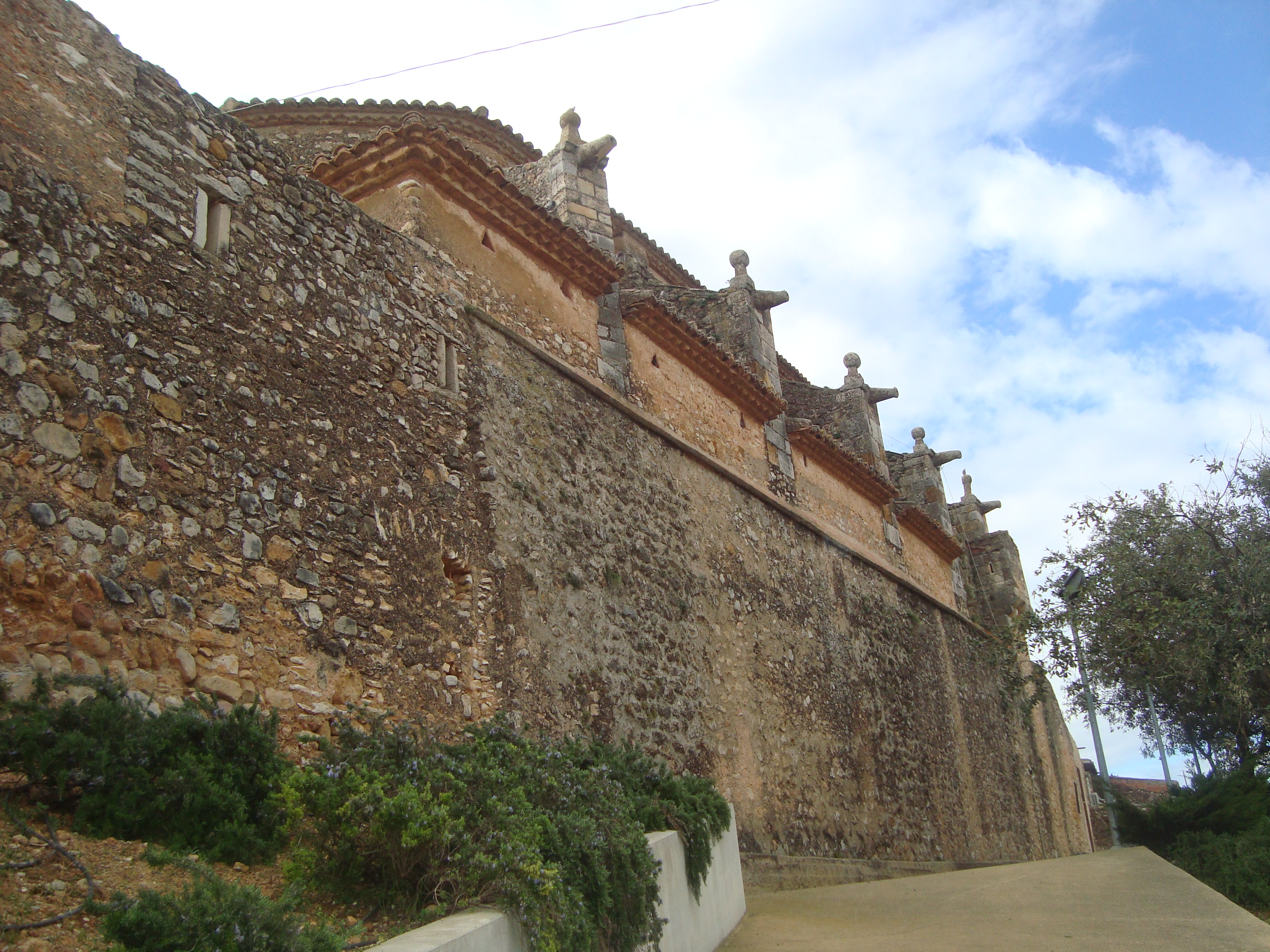 Església parroquial de l'Assumpció (Bell-lloc) 05.029-002.